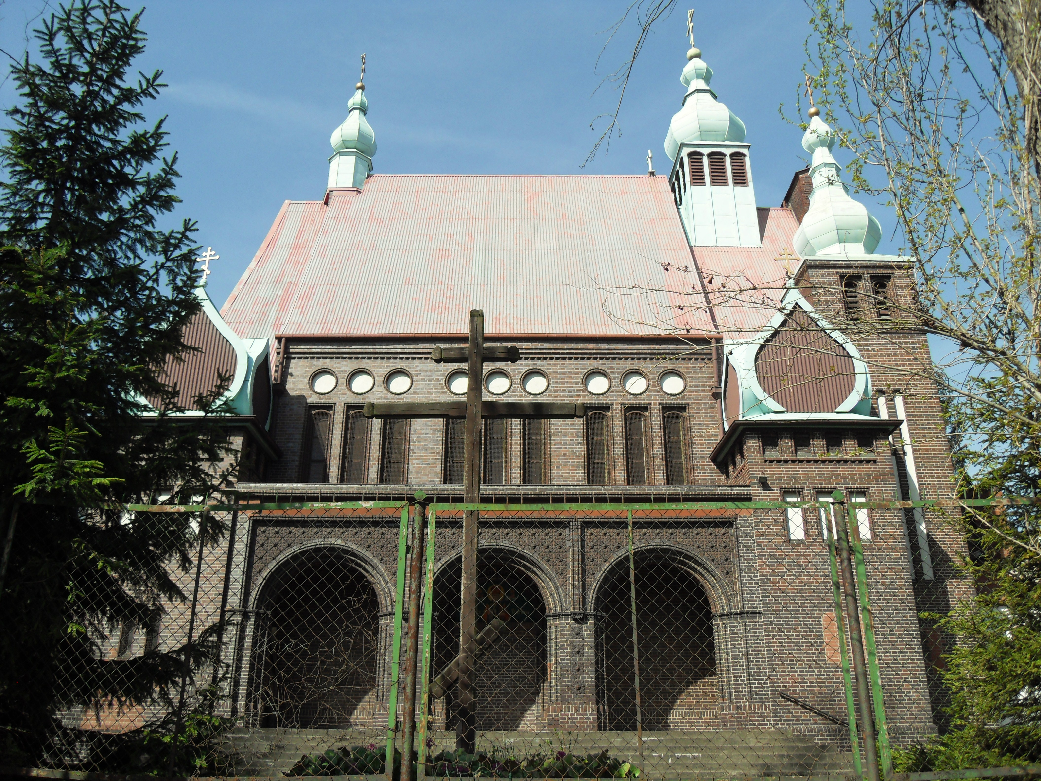 Gdańsk Wrzeszcz Górny, ul. Traugutta 45 - kaplica z krematorium, obecnie katedra prawosławna p.w. św. Mikołaja, 1920